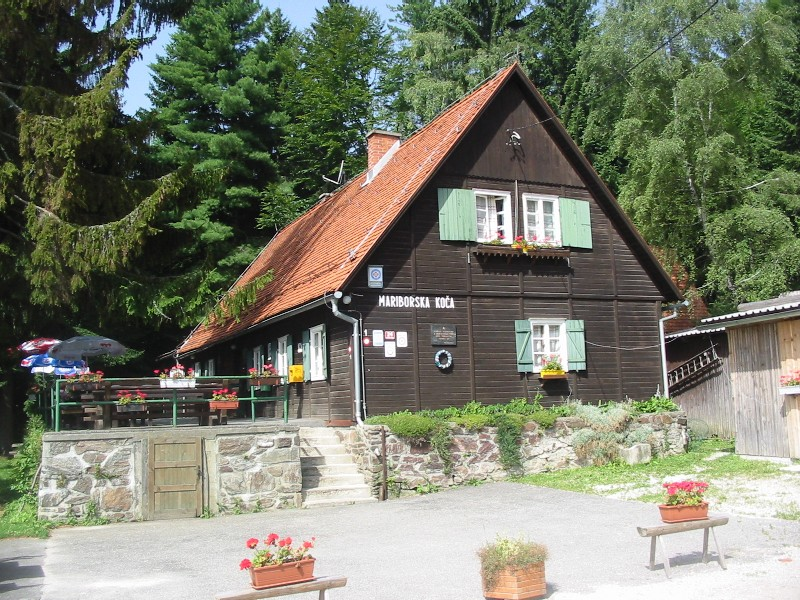 Mariborska koča na Pohorju